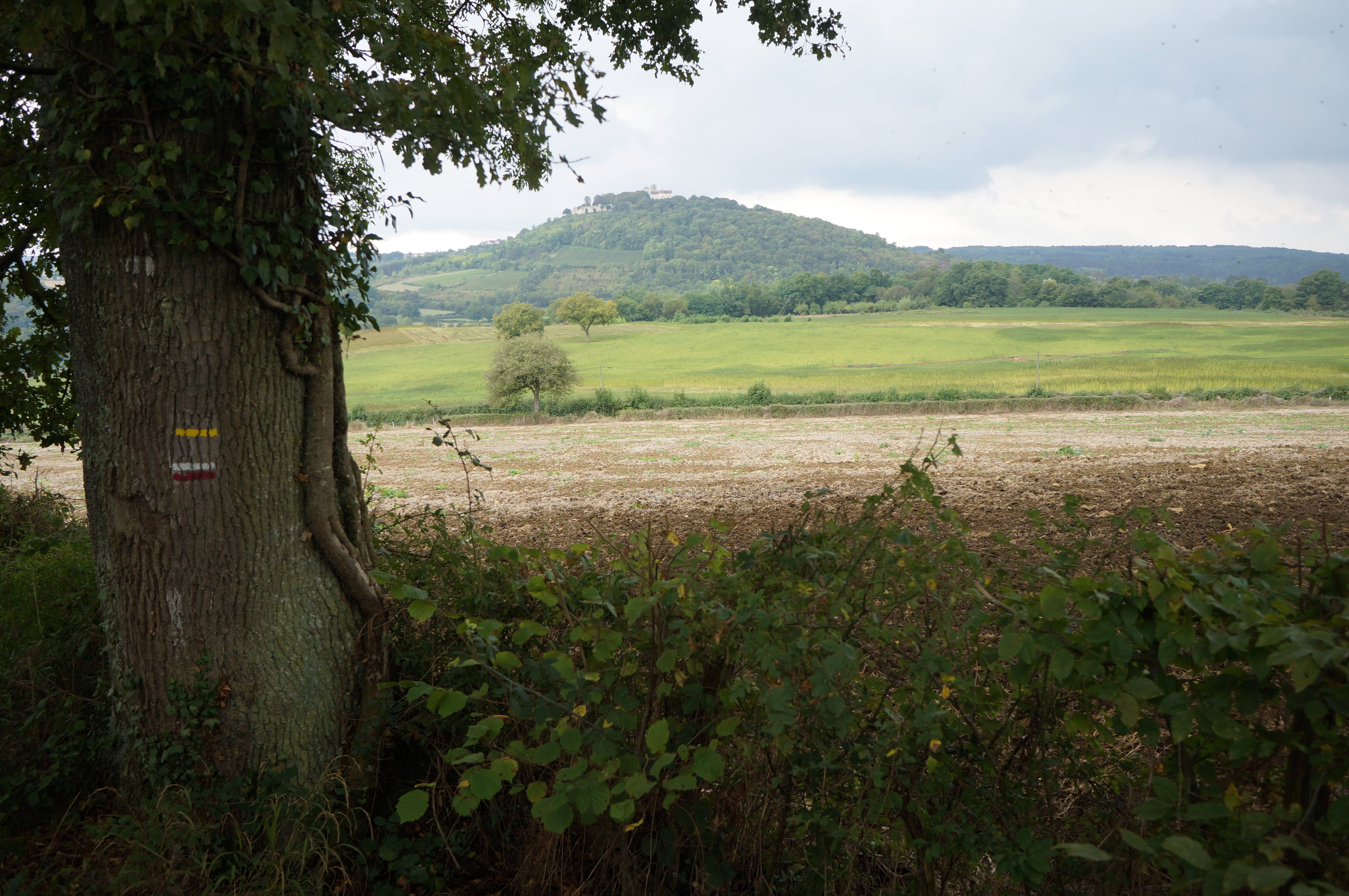 Asquins, Yonne, Bourgogne, France. La colline de Vézelay et sa basilique. Vue vers le sud depuis le chemin de la Cordelle (carte sur geoportail) sur le GR 13 entre Asquins et Vézelay.